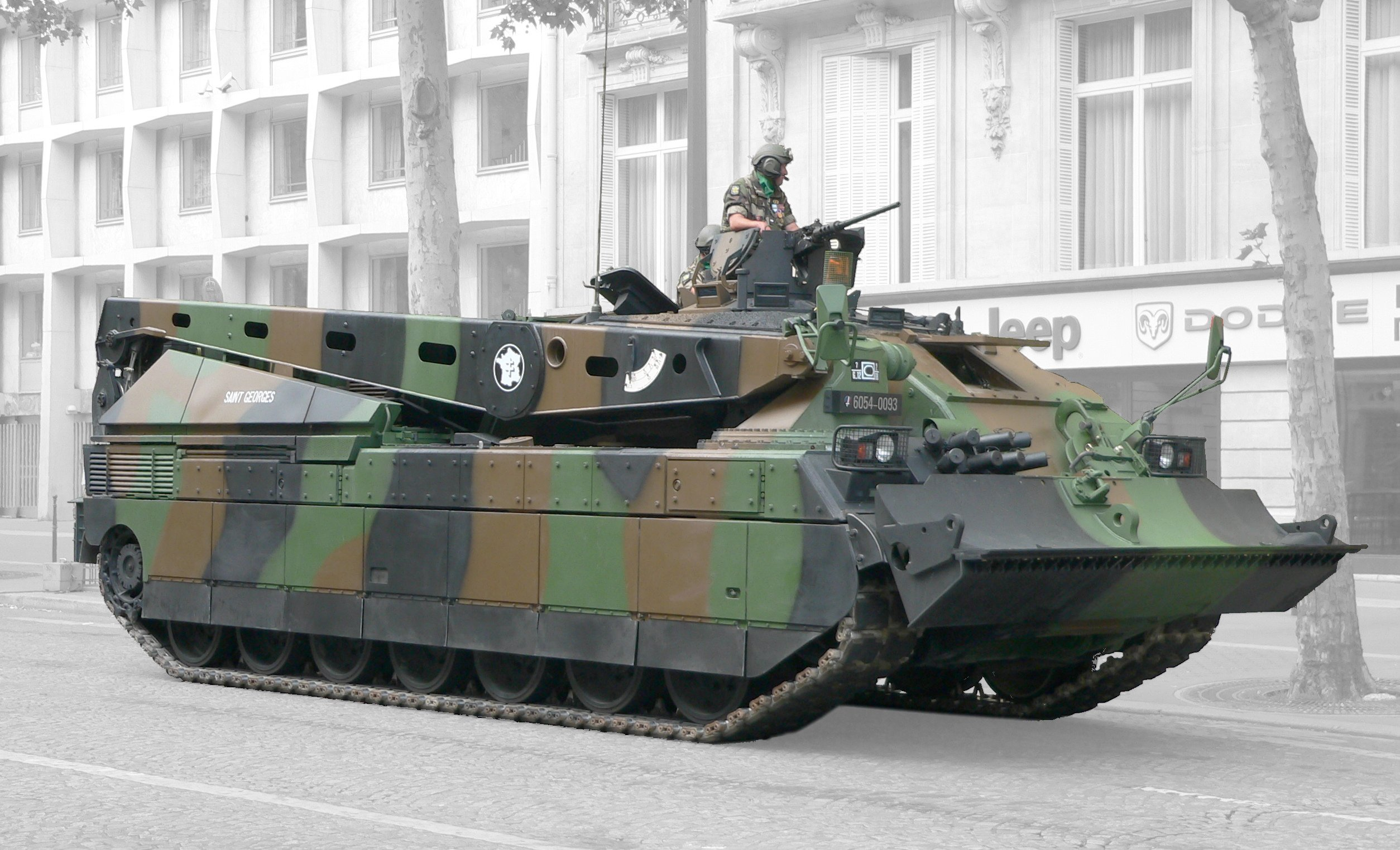 Char de dépannage DNG/DCL. Military parade, Avenue des Champs-Élysées, 14 July 2006